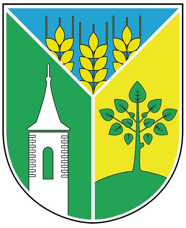 Seit 25.01.2017 das Wappen der Gemeinde Großobringen (Weimarer Land)